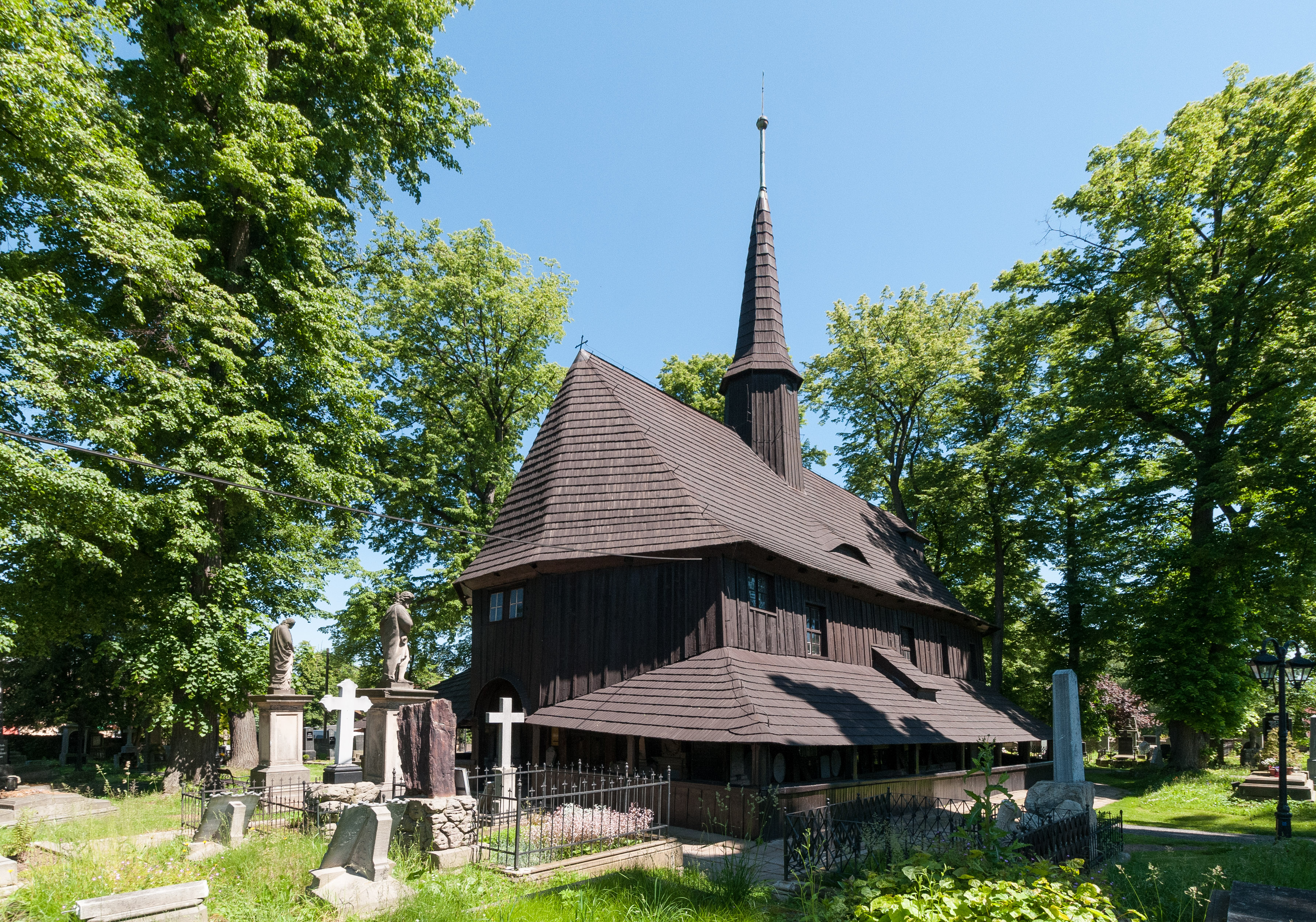 Kościół cmentarny Najświętszej Panny Marii w Broumovie.